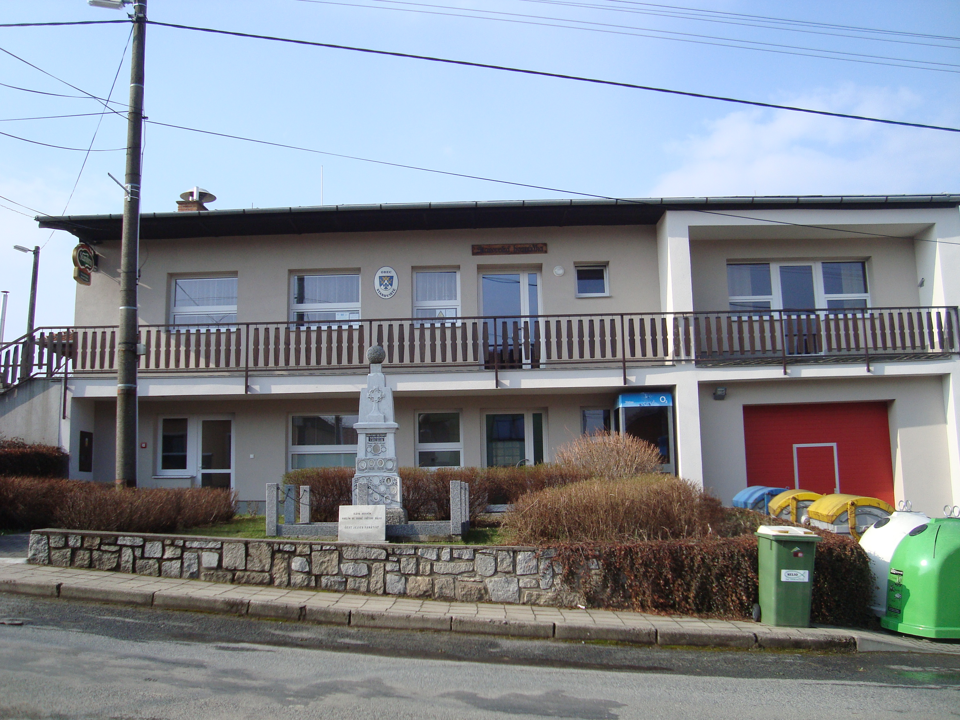 Stanoviště obecní úřad